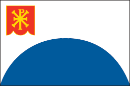 Bandera del Municipio de Purujosa